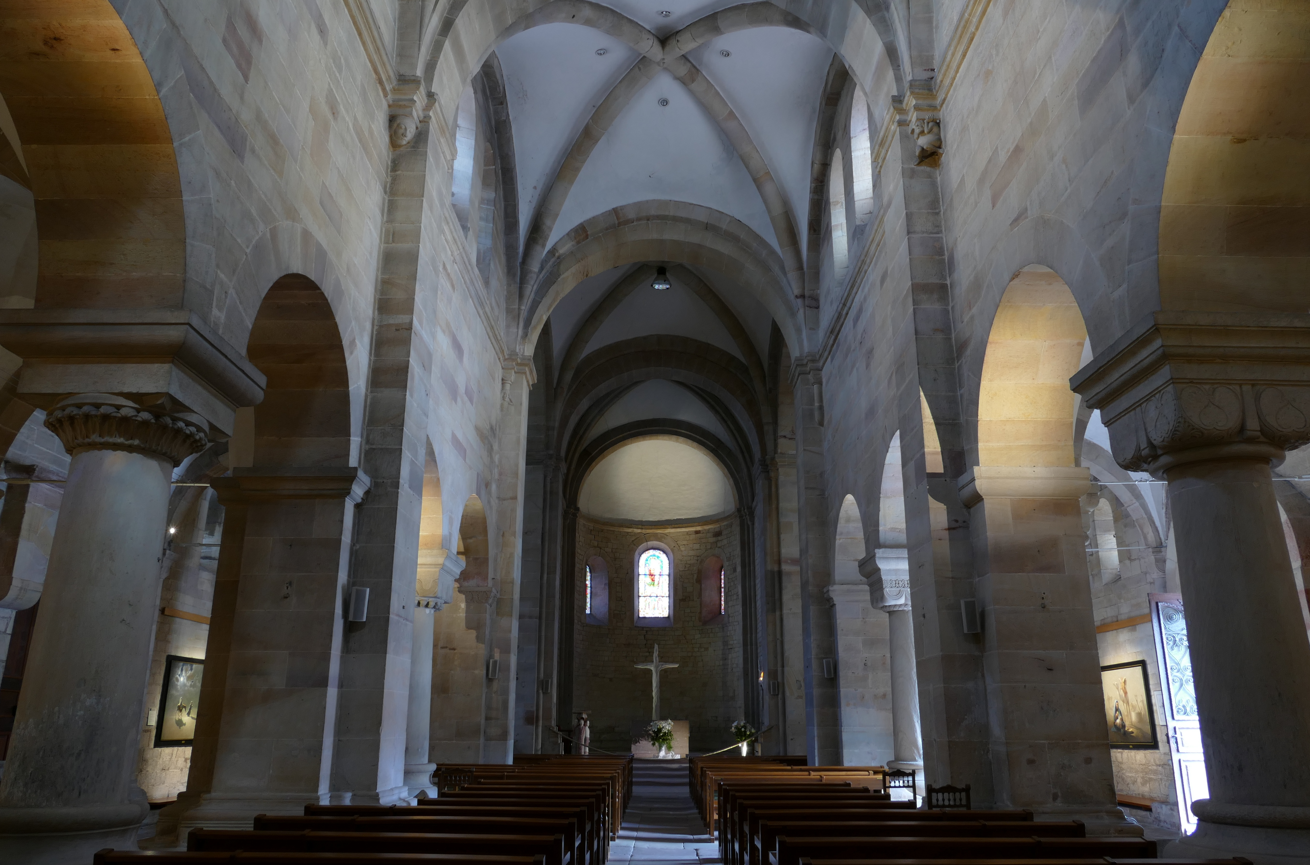 Alsace, Bas-Rhin, Rosheim, Église romane Saints-Pierre-et-Paul (XIIe) (PA00084909, IA00075638): Vue intérieure de la nef.